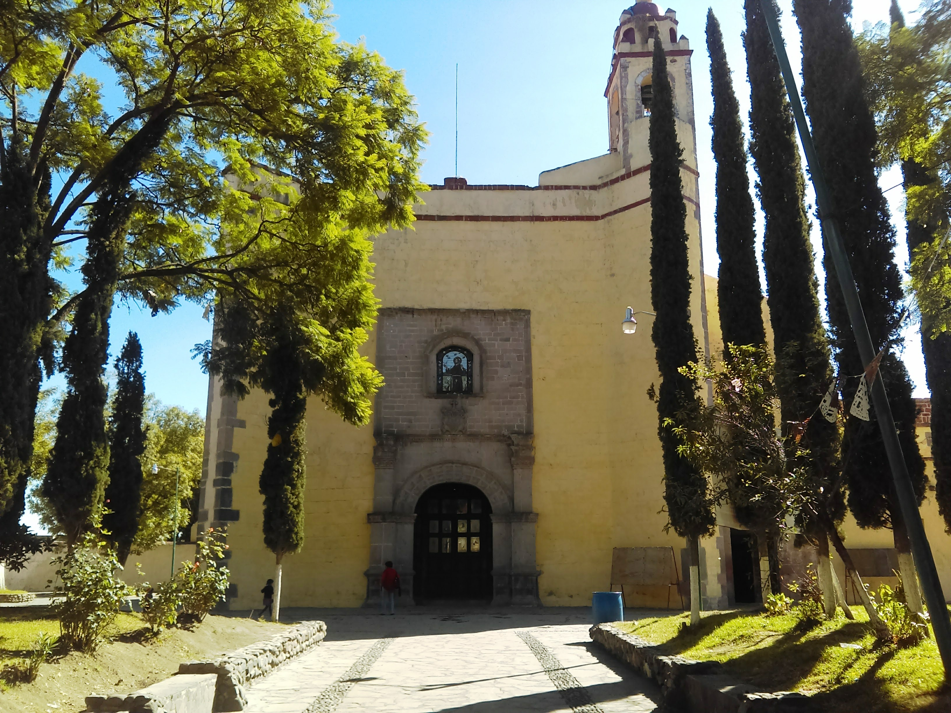 Templo y exconvento de San Francisco en Tepeji del Río, Hidalgo (México).